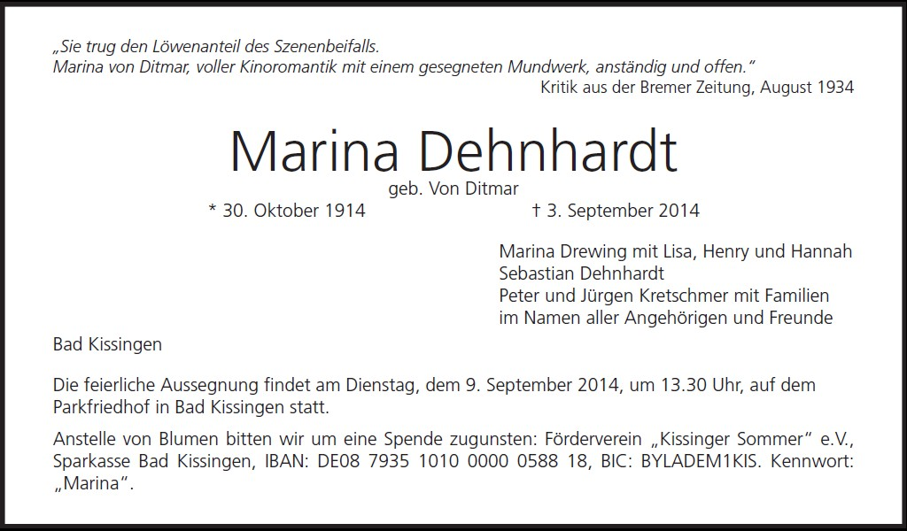 Todesanzeige der früheren UFA-Filmschauspielerin Marina von Ditmar (1914-2014), veröffentlicht in der Saale-Zeitung am 6. September 2014